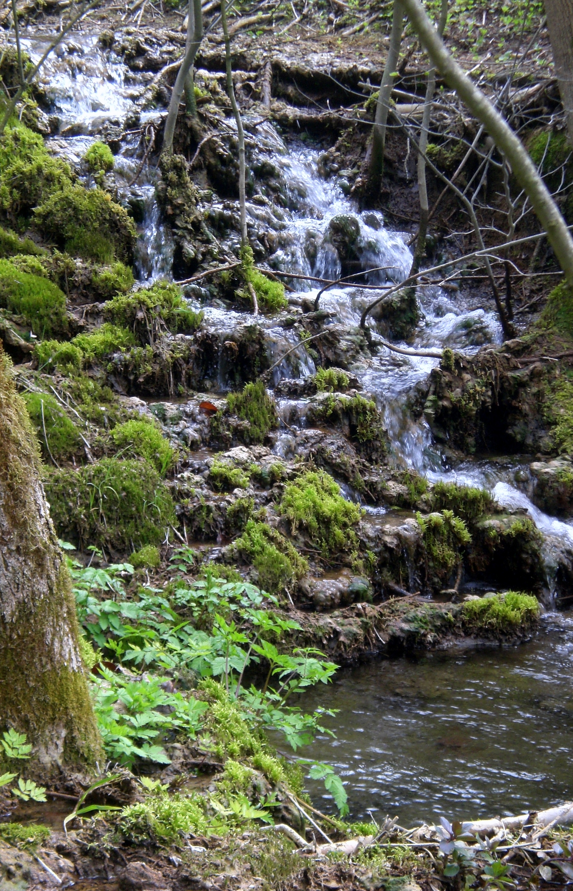 Lillach Sinterterassen